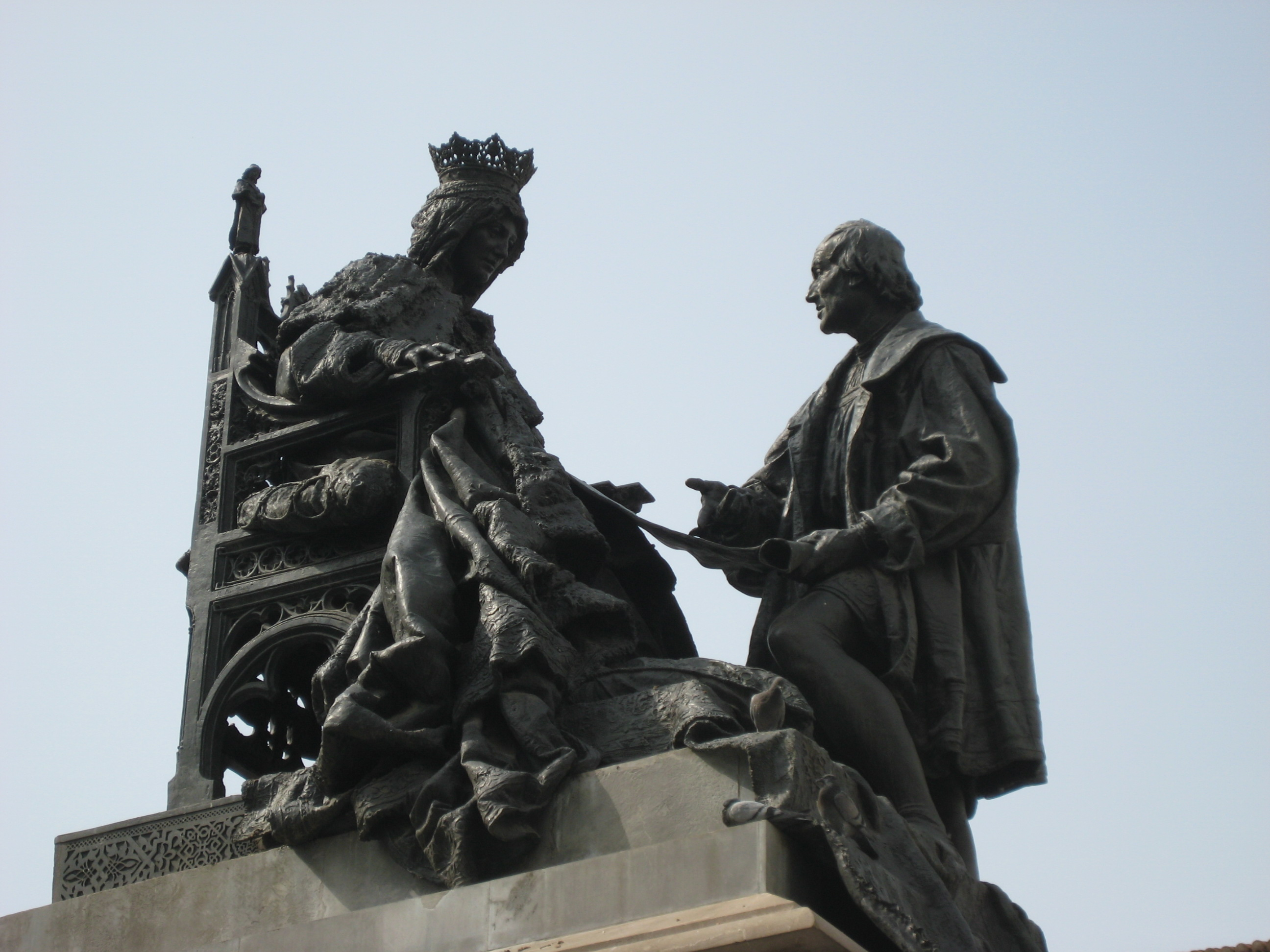 Granada - Kolumbusdenkmal Zwiegespräch zwischen Königin Isabella und C.Kolumbus